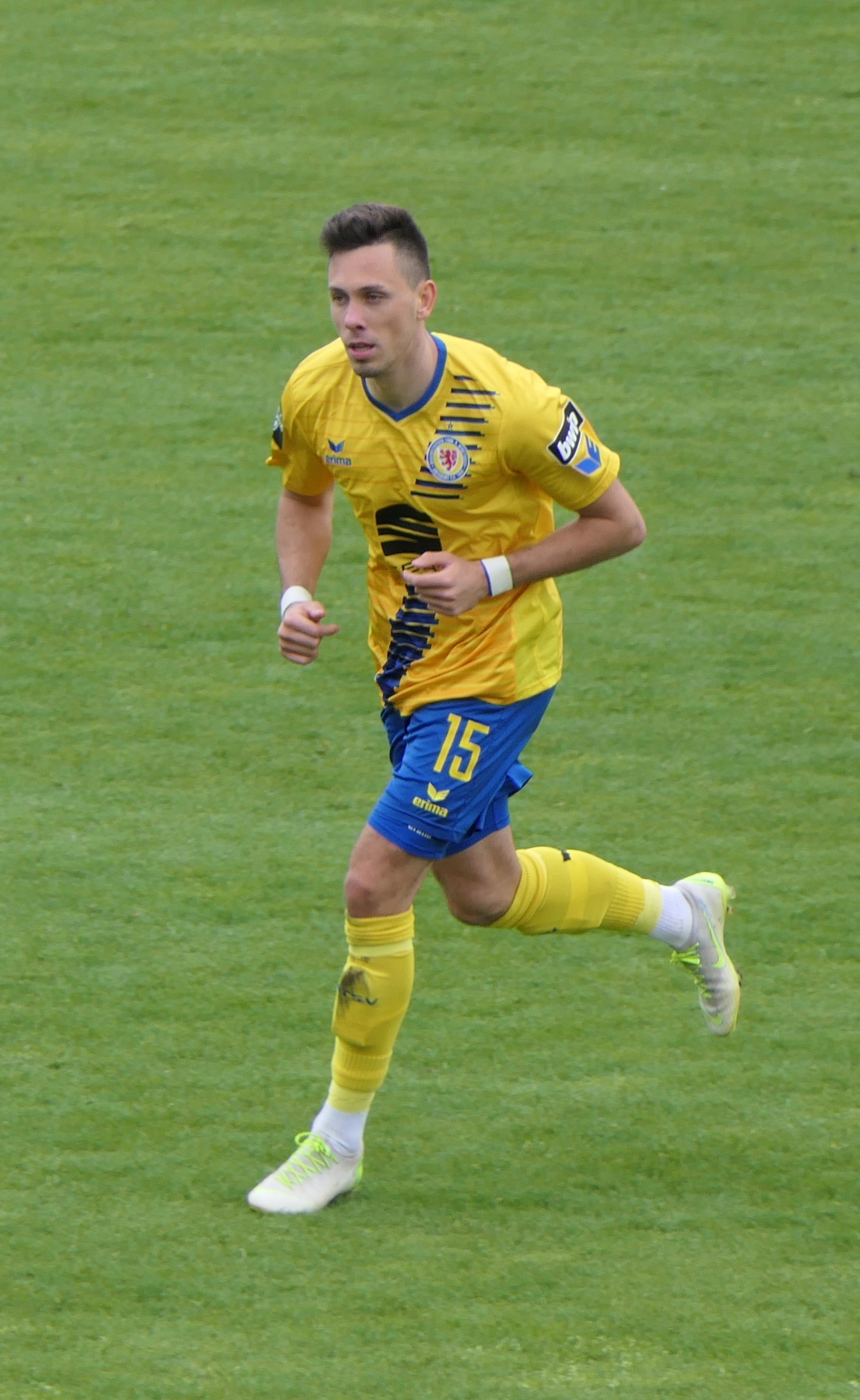 Der Fussballprofi Marcel Bär im Trikot von Eintracht Braunschweig beim Auswärtsspiel beim VfR Aalen am 05.05.2019.